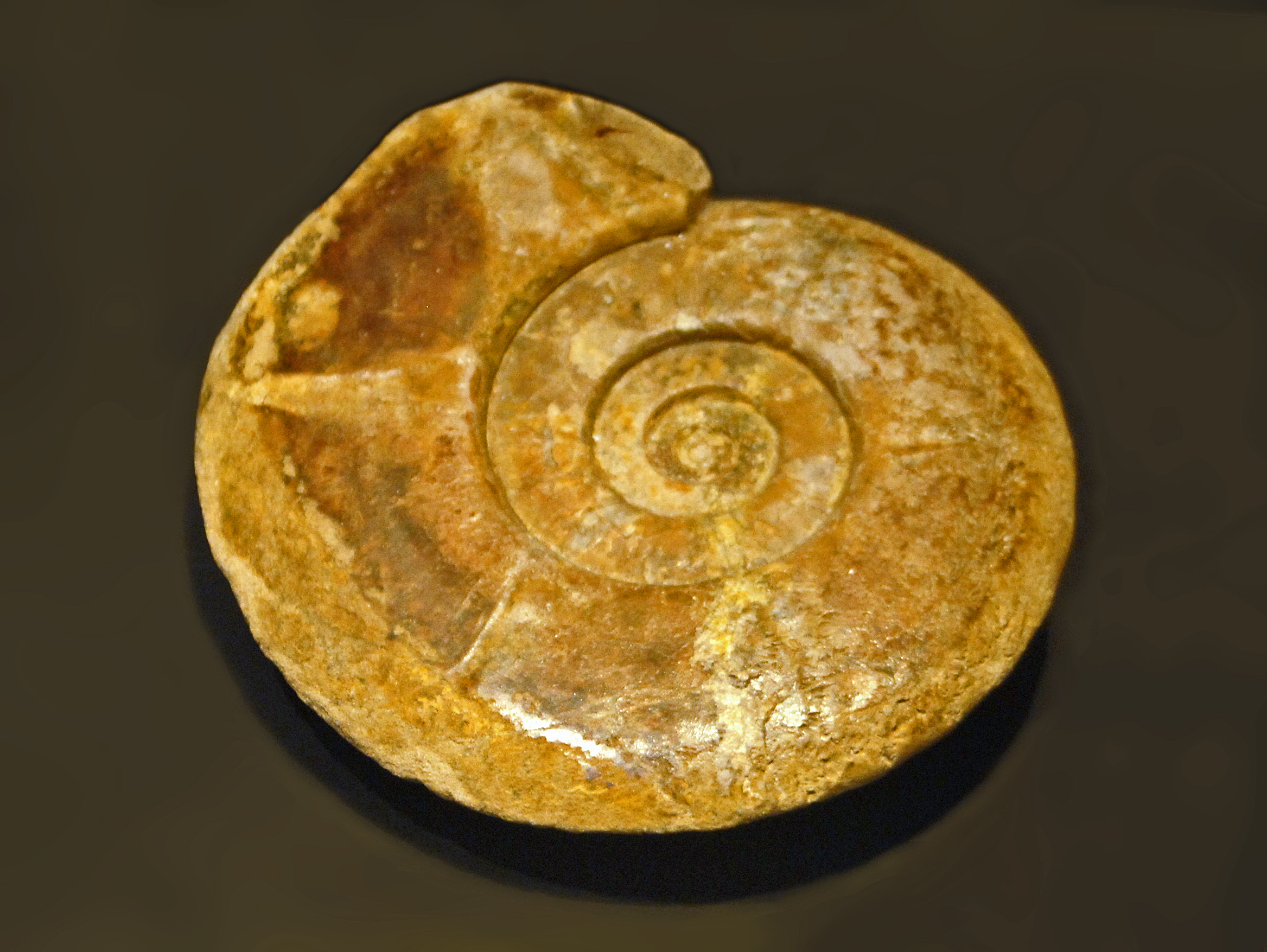 Hauericeras gardeni from Madagascar